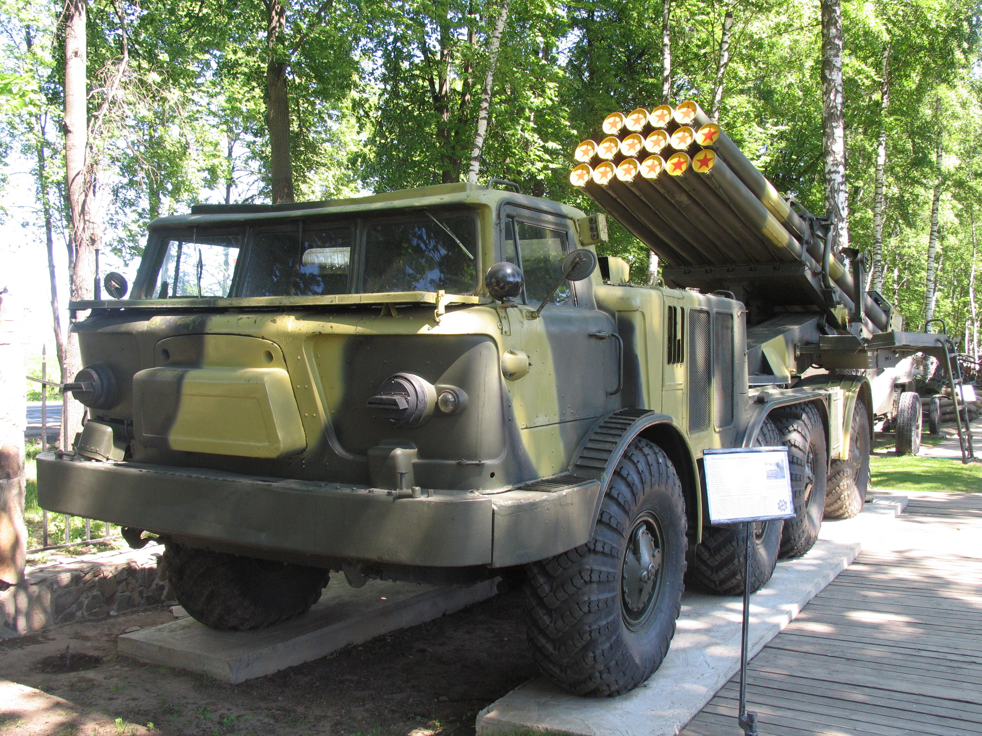 РСЗО БМ-27 Ураган в Музее техники Задорожного.